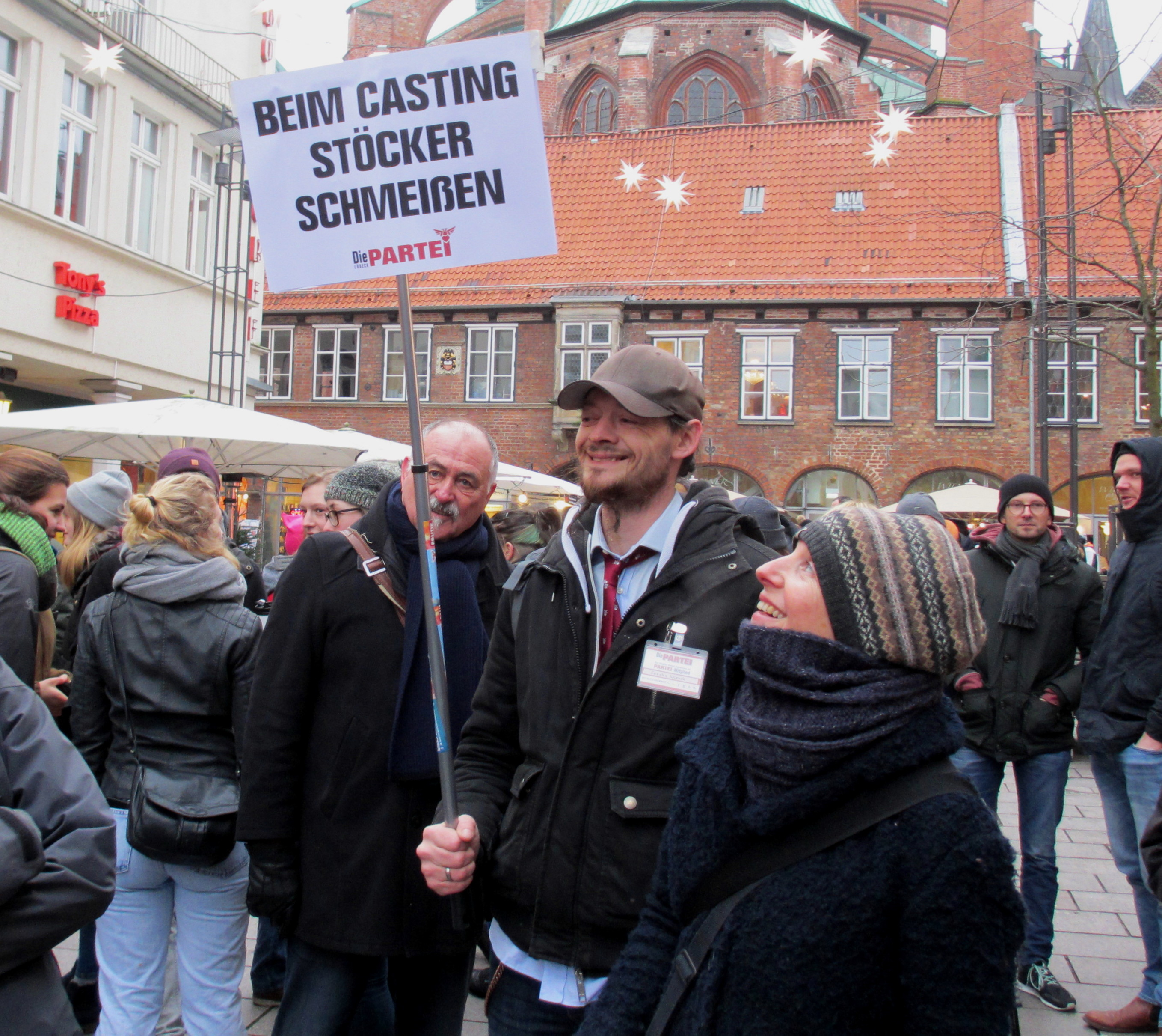 Kundgebung des Lübecker Bündnisses Womens March am 13. Januar 2018 auf dem Schrangen gegen frauenfeindliche Äußerungen des Unternehmers Winfried Stöcker.